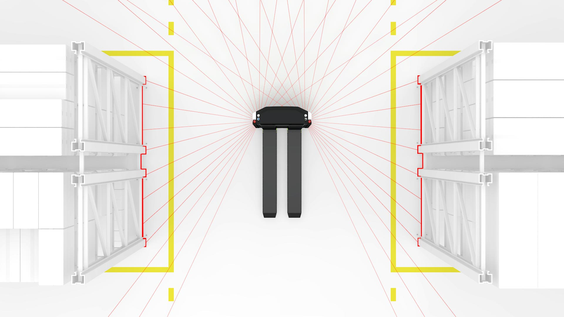 Rilevamento e ricostruzione dei contorni dell'ambiente fatta da un IGV